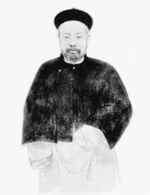 孚琦，清朝官员